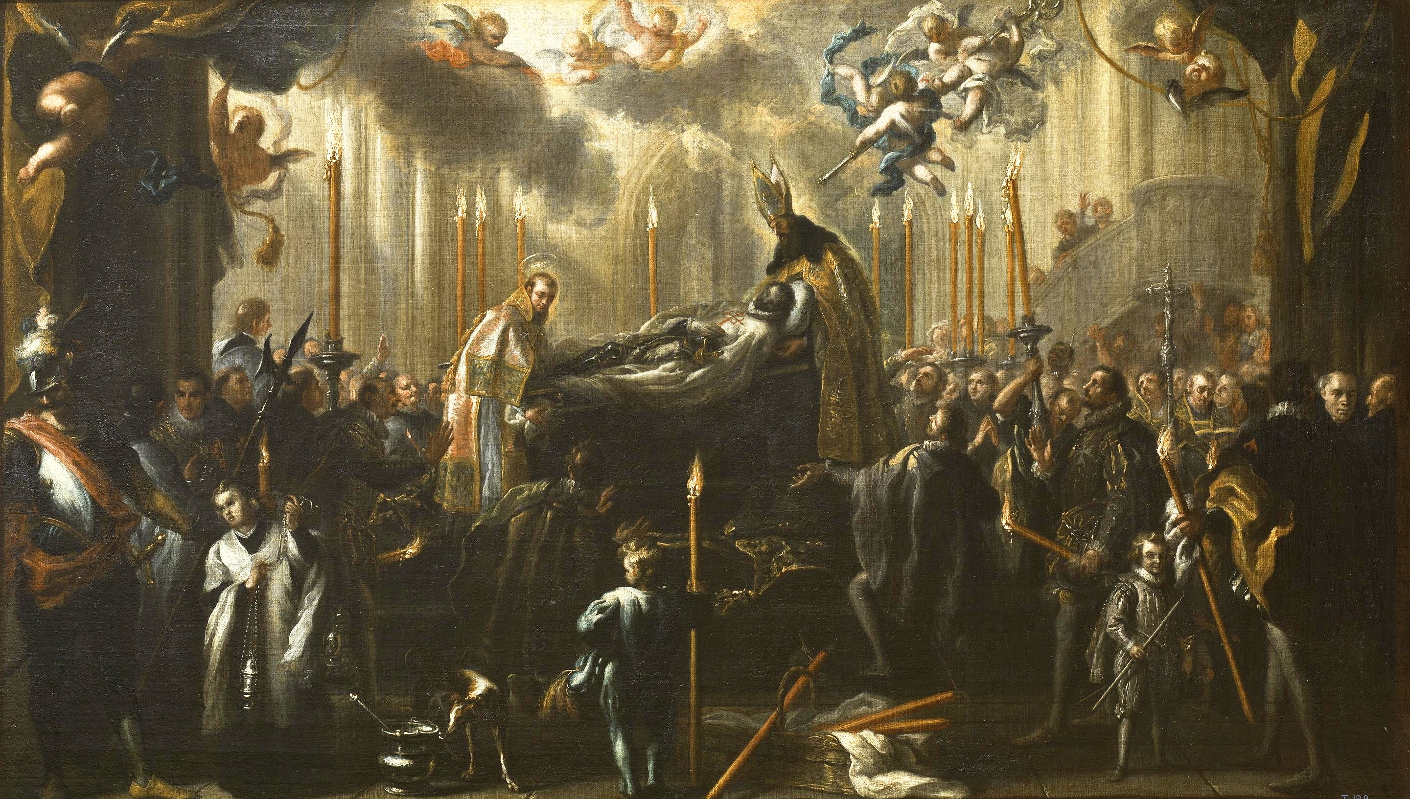 La obra representa el entierro milagroso de Gonzalo Ruiz de Toledo, que fue señor de Orgaz y falleció en Toledo el día 3 de diciembre de 1323, durante el reinado de Alfonso XI de Castilla, en la iglesia de Santo Tomé de Toledo. Según los relatos de la época, cuando estaban dando sepultura a su cadáver en dicho templo se aparecieron San Agustín de Hipona y San Esteban quienes, sosteniéndolo el primero por la cabeza y el segundo por los pies, lo depositaron en el sepulcro.